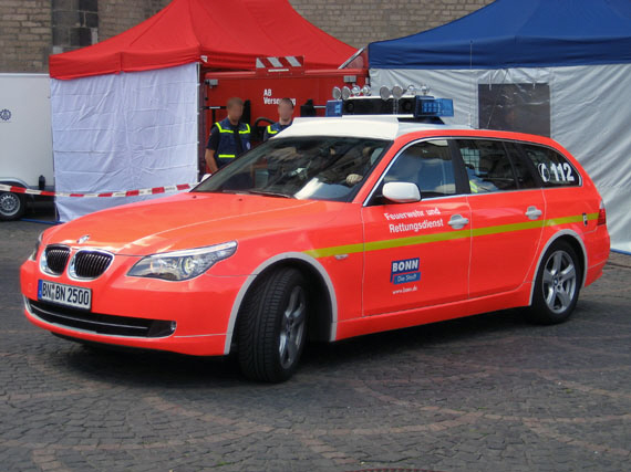 Einsatzfahrzeug des A-Dienstes